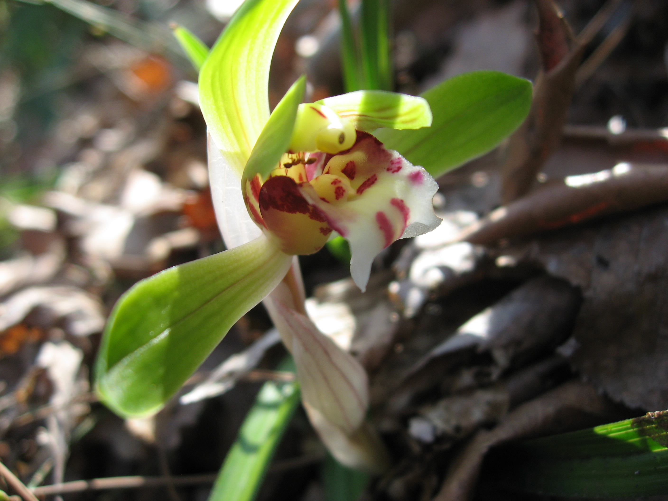 シュンラン Cymbidium goeringii